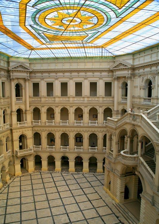 Warszawa (Polska)